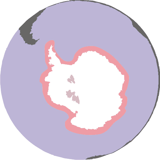 Weddell seal range